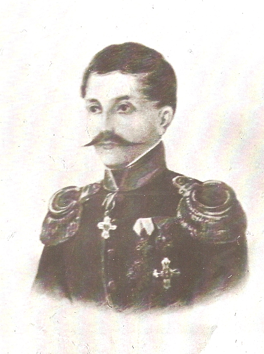 Antonio_Conforti_litografia